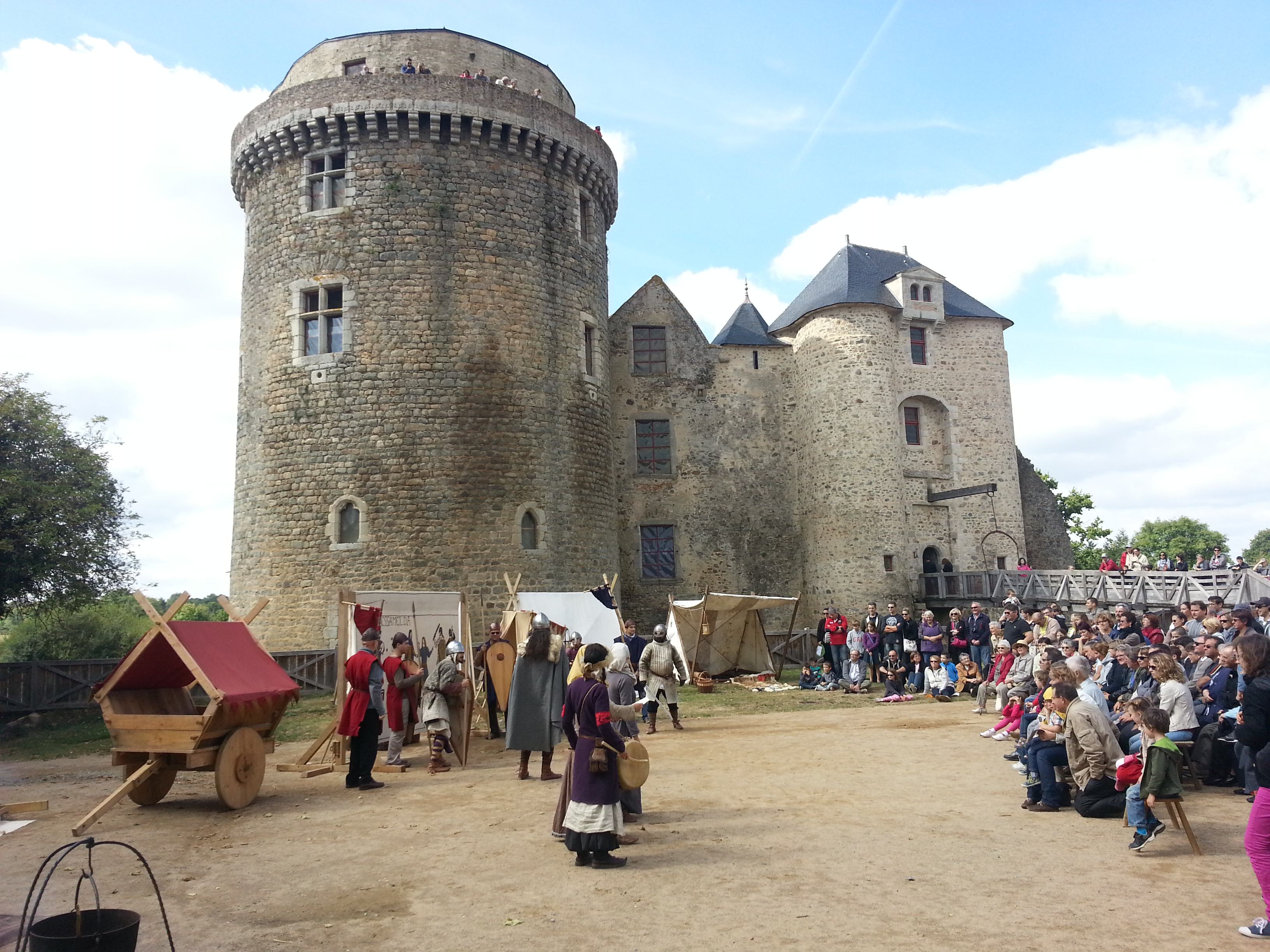 Château de Saint-Mesmin. Animation du château par la compagnie Nessamelda lors des journées du patrimoine 2013.